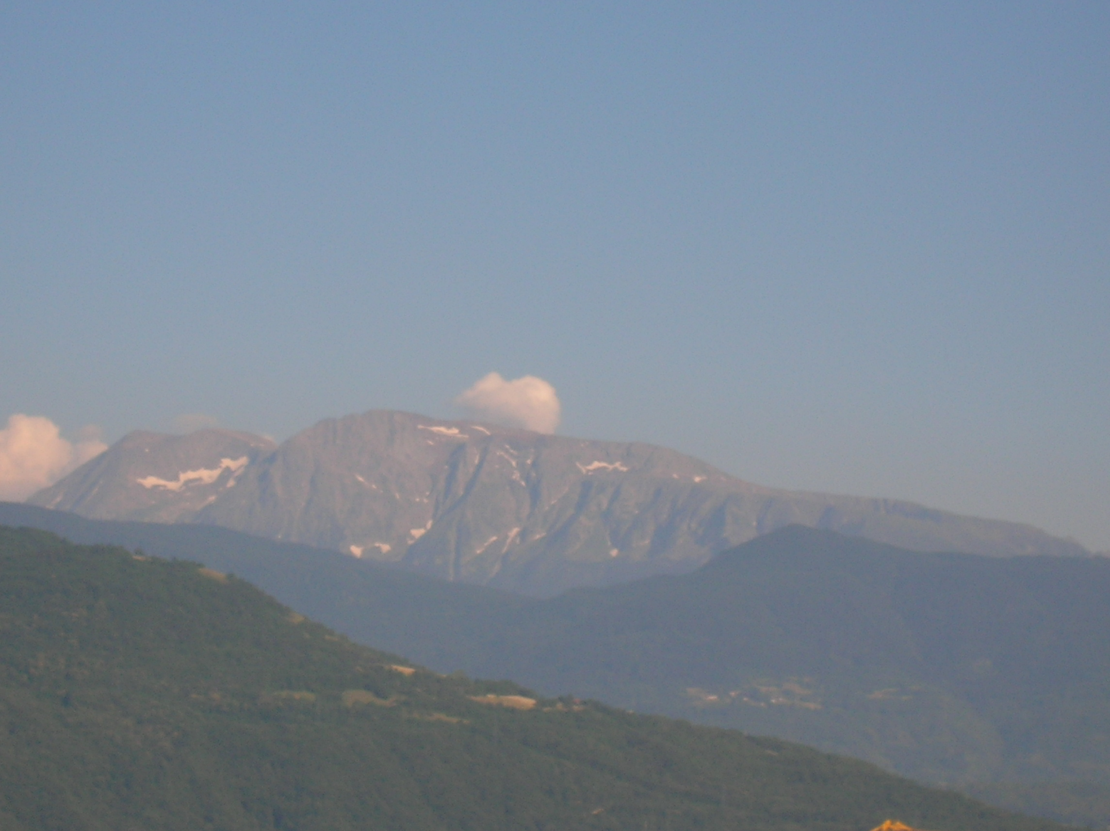 Le Grand Galbert, only Taillefer visible